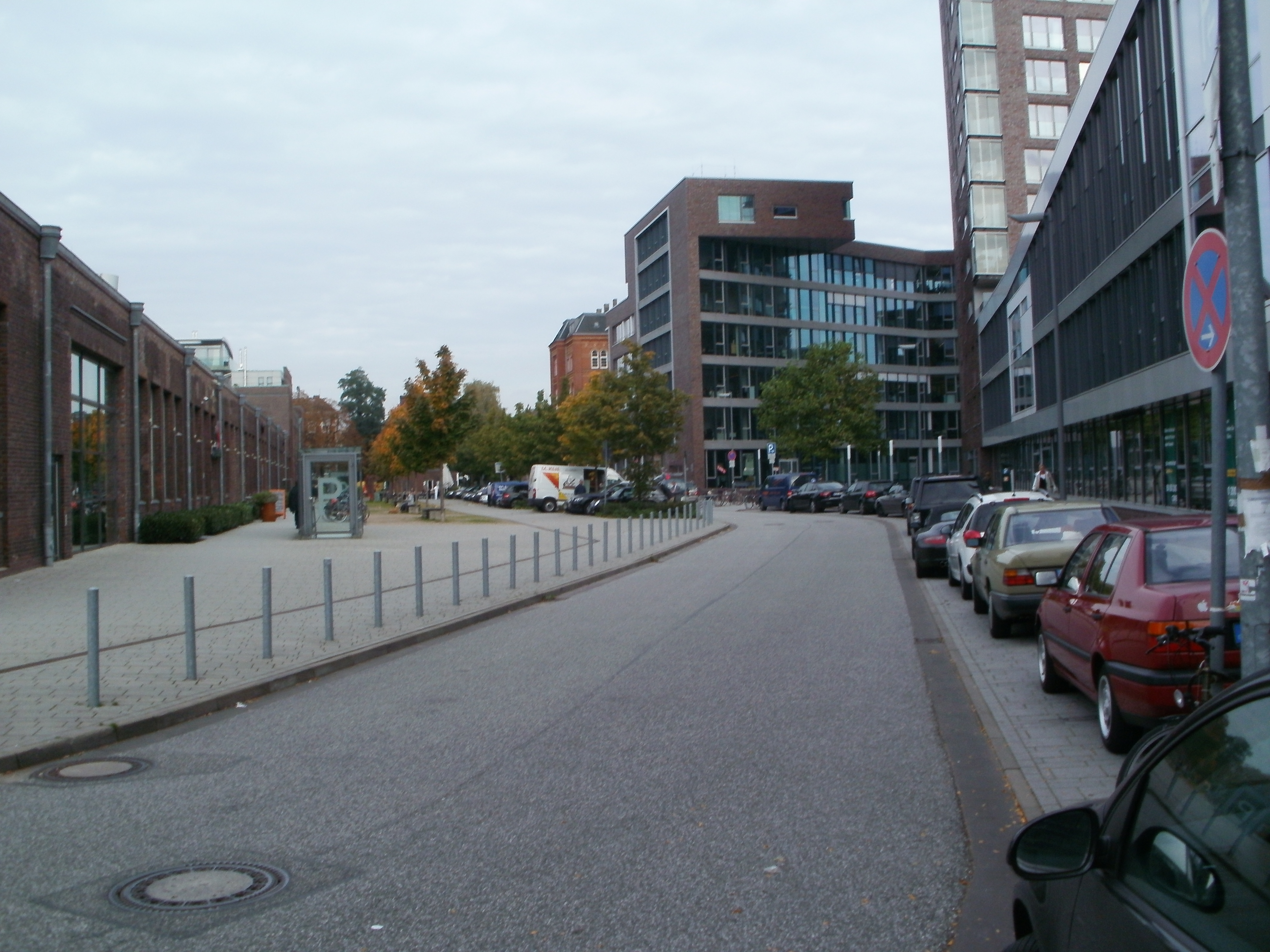 Eine Straße in Hamburg-Hoheluft(Ost) mit dem Namen Straßenbahnring